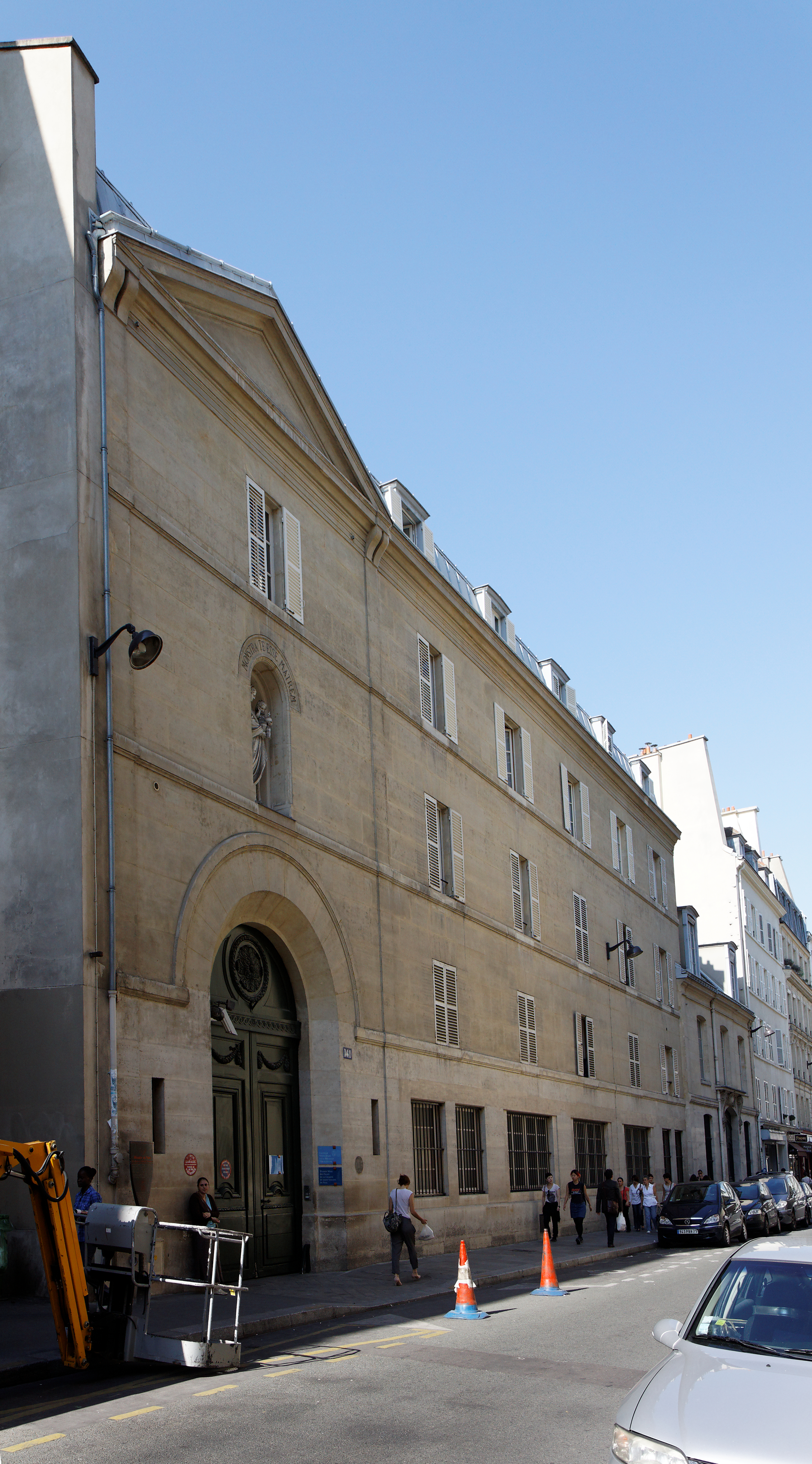 La maison des Filles de la charité, 136-140 rue du Bac, à Paris. .